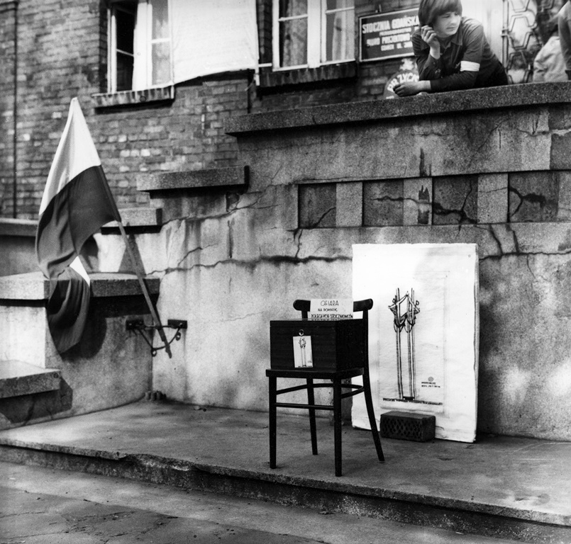 odczas strajku trwała zbiórka środków na budowę Pomnika Poległych Stoczniowców 1970. Przed wejściem do Biura Projektowo-Konstrukcyjnego Stoczni Gdańskiej im. Lenina stała kaseta na pieniądze, za nią szkic pierwotnego projektu Pomnika autorstwa inżyniera Bogdana Pietruszki.